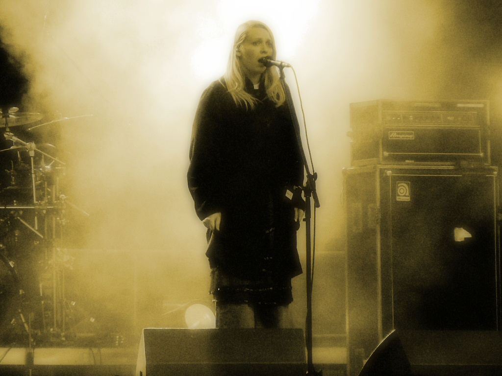 Kasia Nosowska na koncercie Hey'a podczas Juvenaliów 2006, na stadionie Syreny.